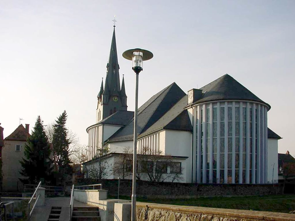 St.Markus in Muehlheim am Main